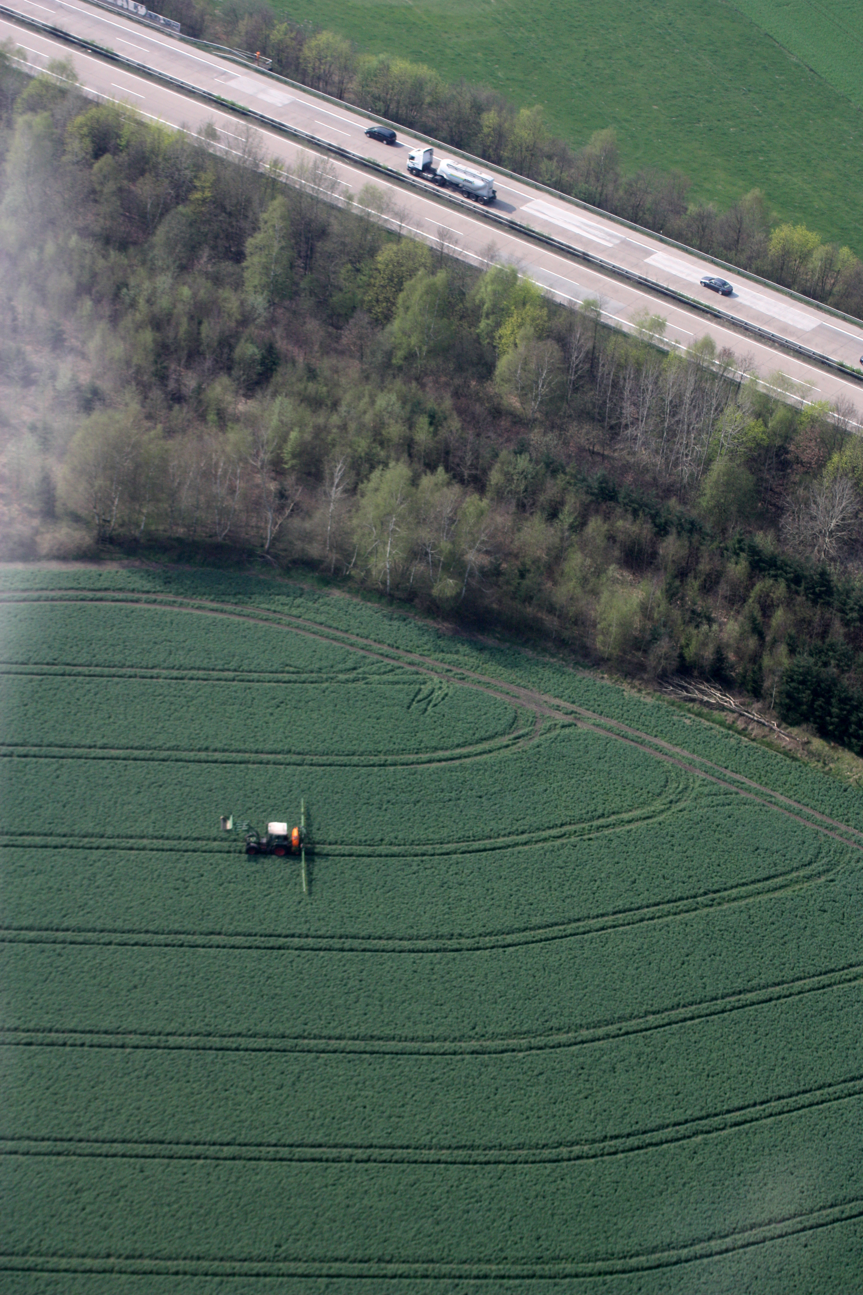 Dreieck Ahlhorner Heide und nähere Umgebung; östlich der A28 vom Dreieck Richtung Oldenburg; Frontladertraktor mit Anbauspritze im Getreidefeld, Fahrgassen